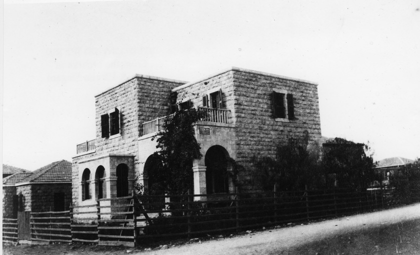 בית אליעזר ילין-הבית הראשון בשכונת רחביה ירושלים בשנת 1937 - דגני